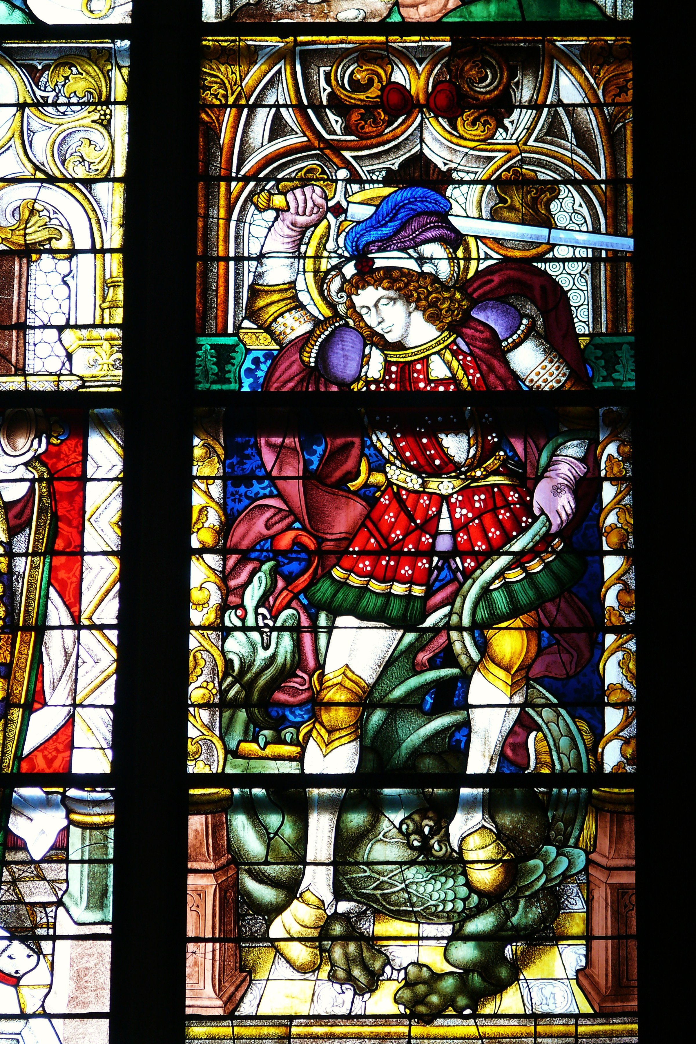 St.Georg im Marienkrönungsfenster von 1509 im Nordseitenschiff des Kölner Doms